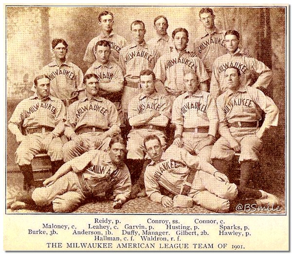 1901 Milwaukee Brewers